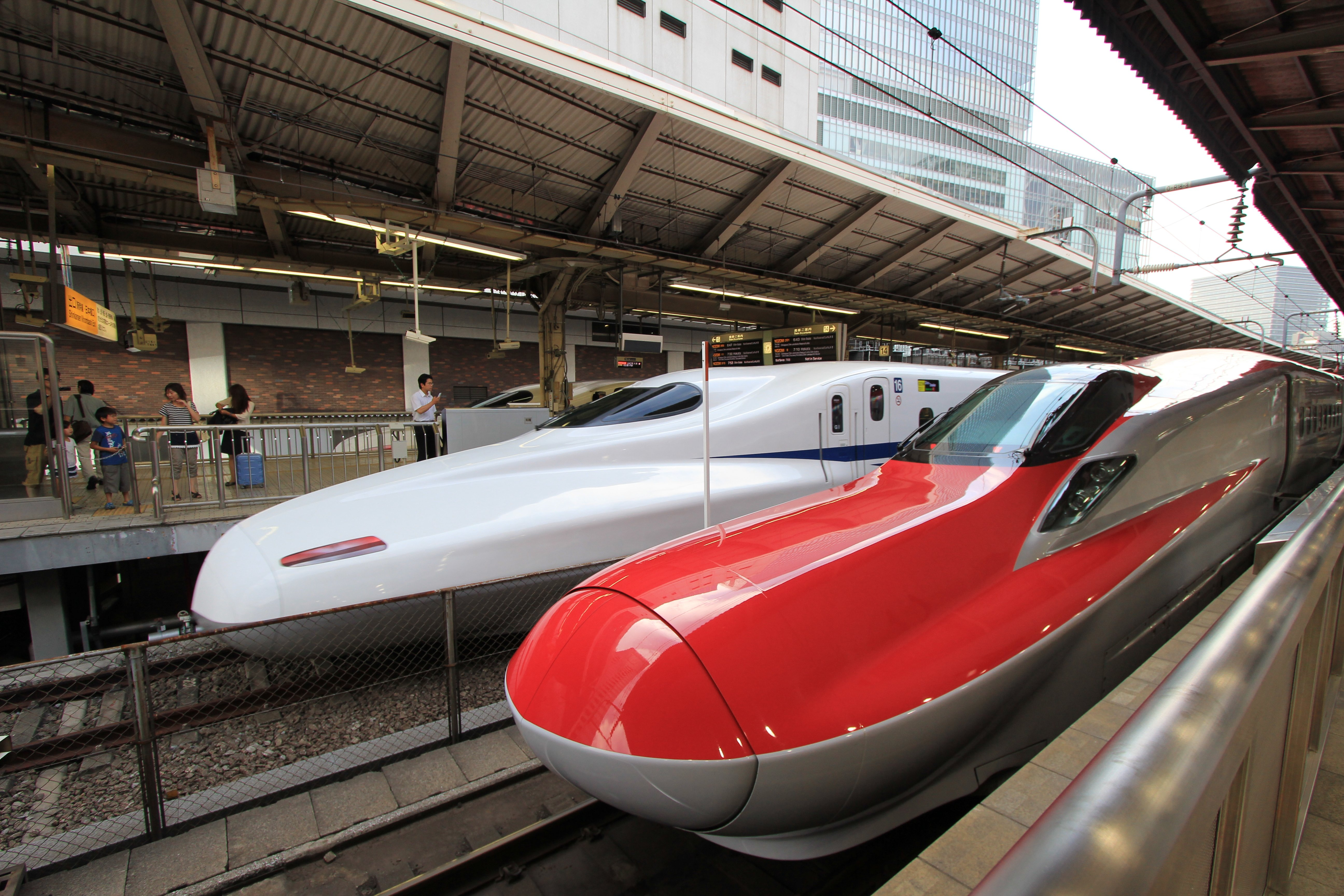 東京駅